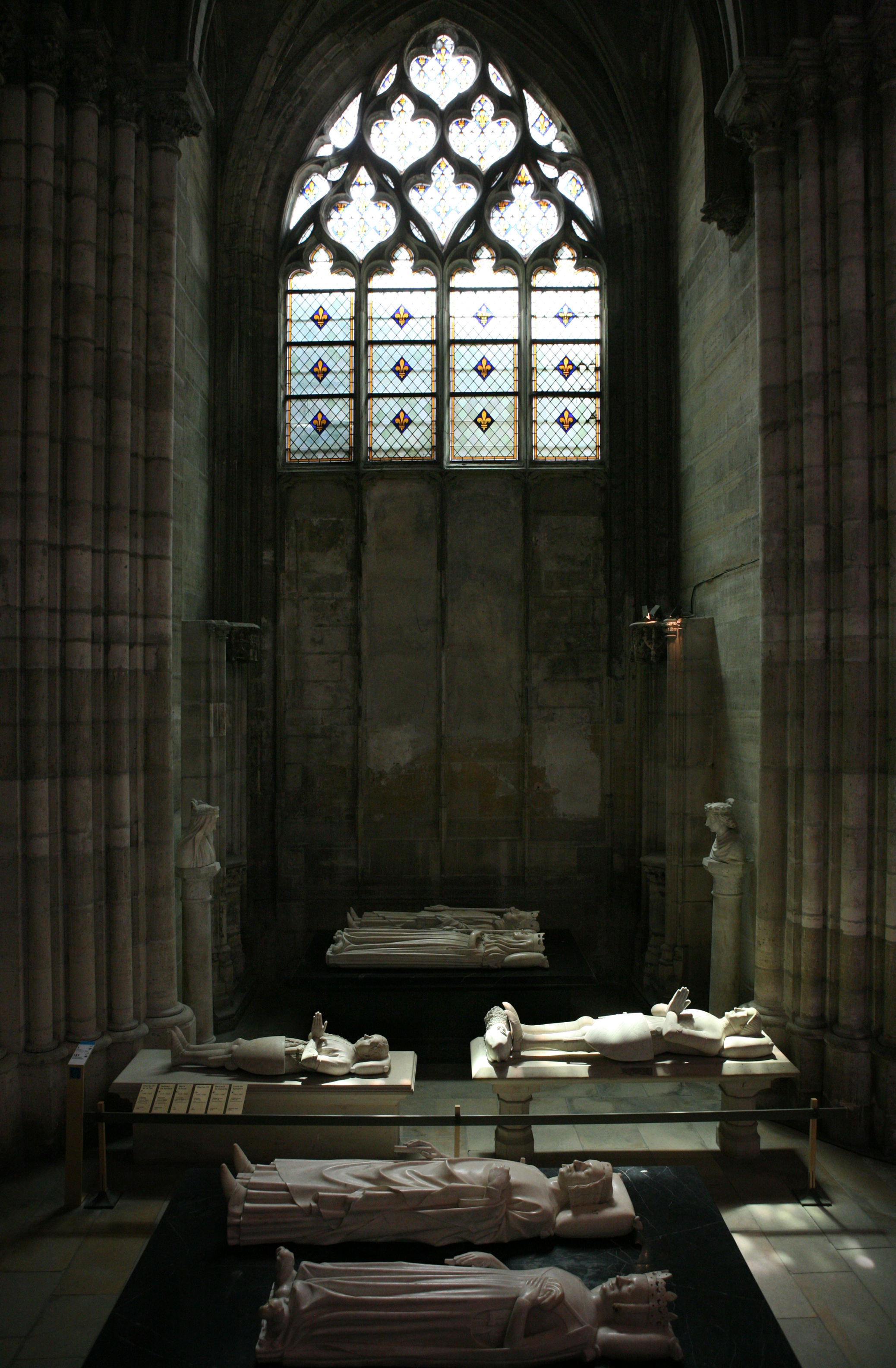 Basilique Saint-Denis - (Depuis la gauche dans le sens horaire) Gisantds de Bertrand Du Guesclin, Charles VI, Isabeau de Baviere, Louis de Sancerre, Charles V le Sage, Jeanne de Bourbon.